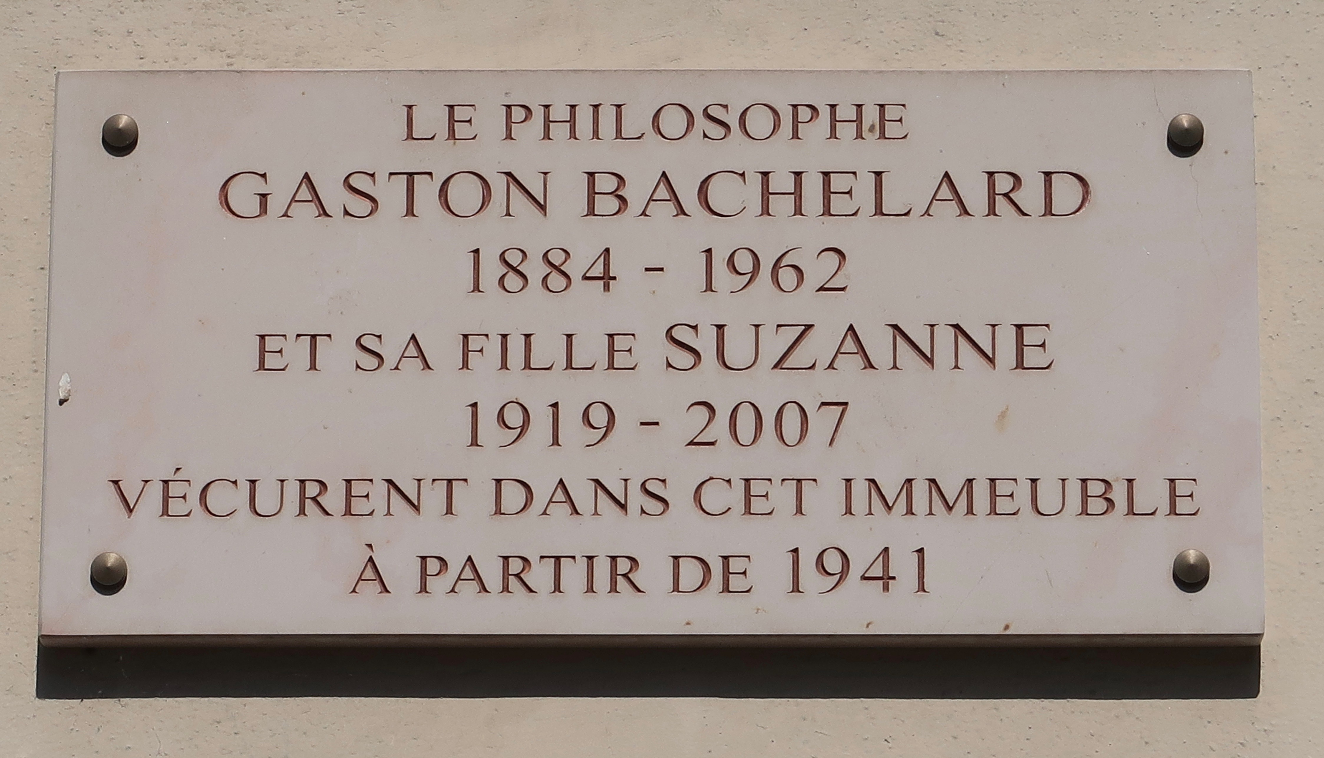 Plaque en hommage à Gaston et Suzanne Bachelard, 2 rue de la Montagne-Sainte-Geneviève (Paris, 5e).